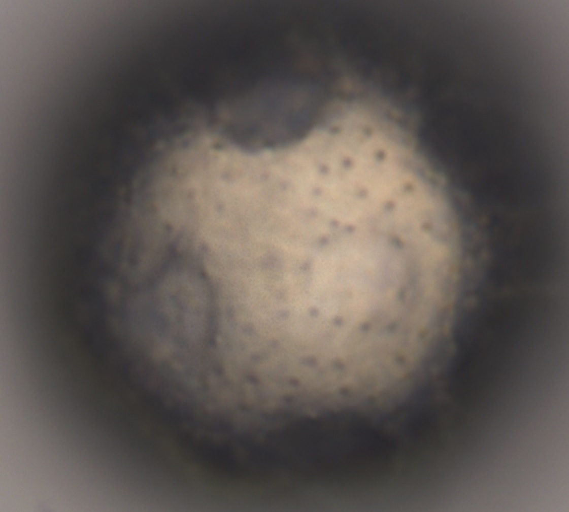 Pollen des Taubenkropf-Leimkrauts (400x)